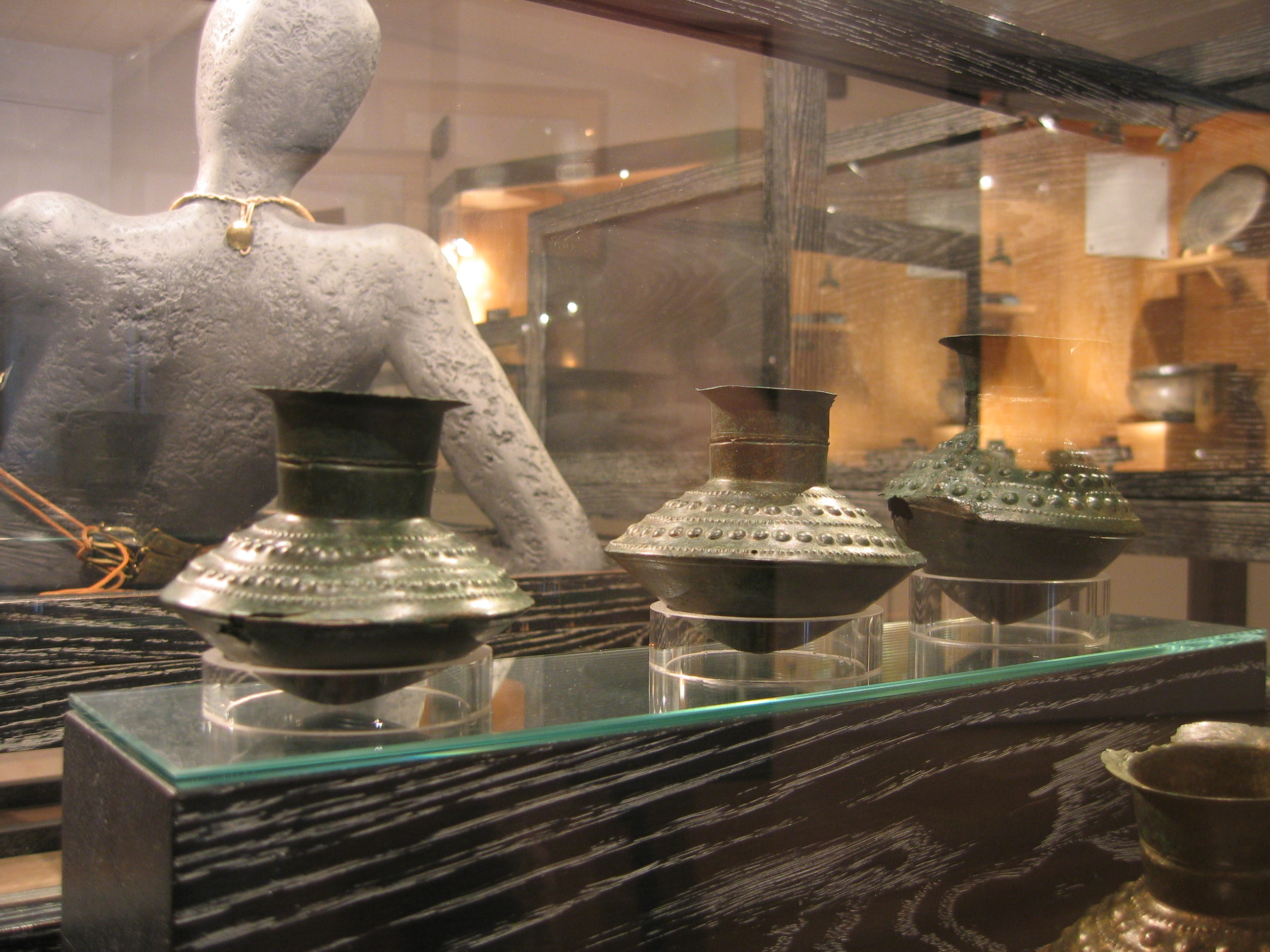 Vases en bronze martelé musée archéologique Dijon France